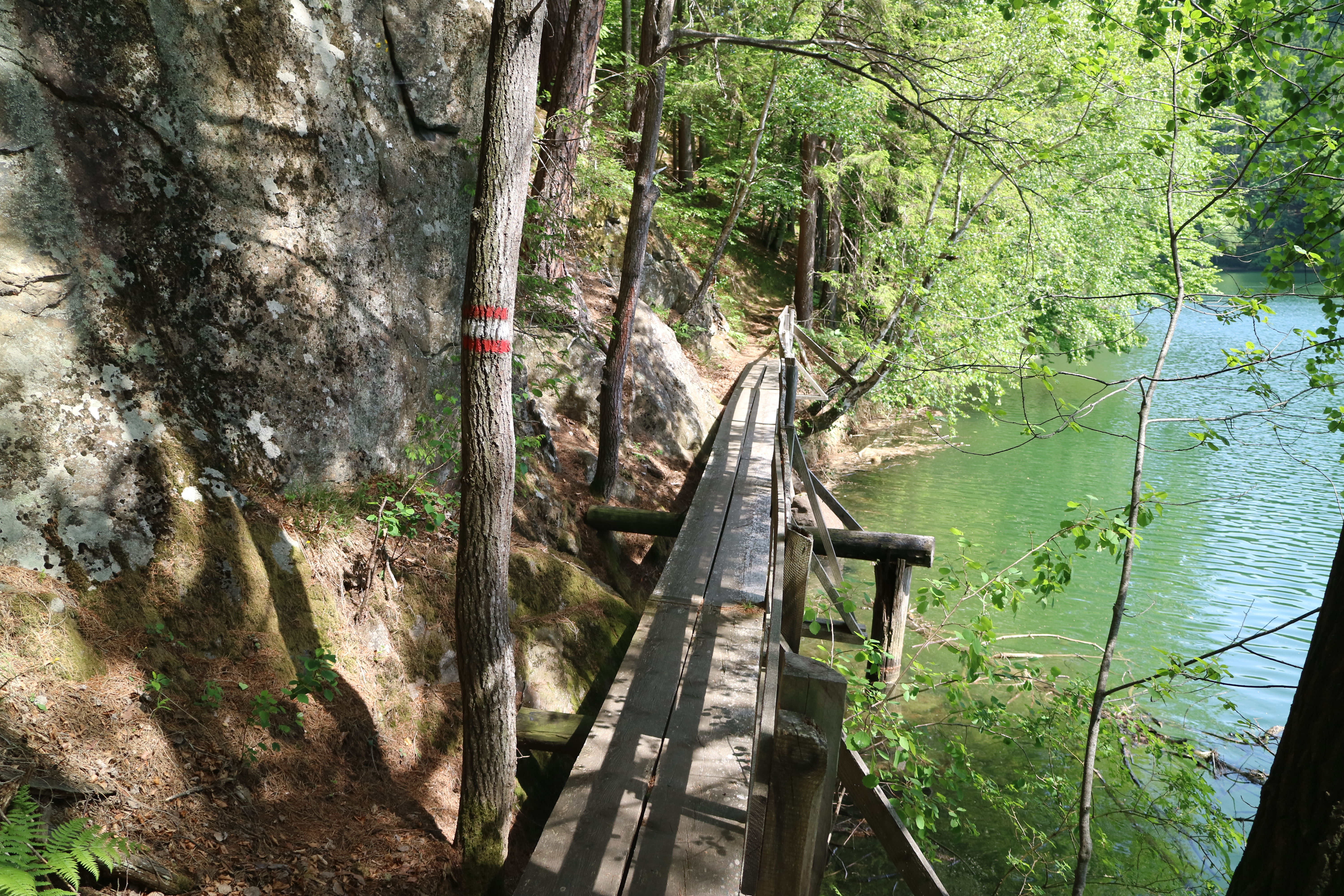 Hans-Kloepfer-Wanderweg am Hirzmann-Stausee, Gemeinde Edelschrott, Steiermark